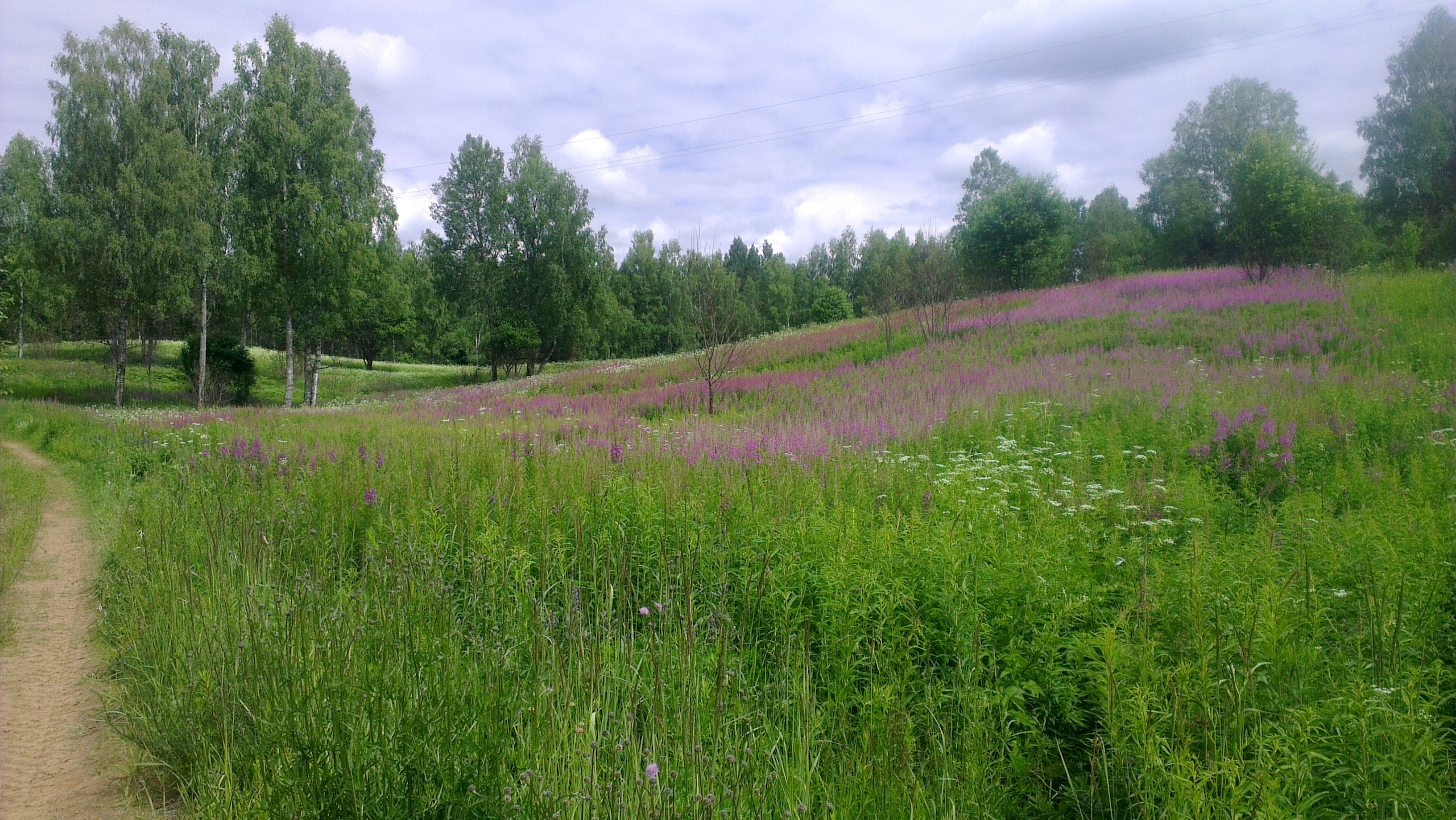 Около д. Сидорово